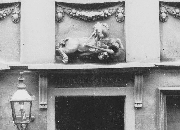 Apoteket Enhörningens signum vid Hornsgatan 5